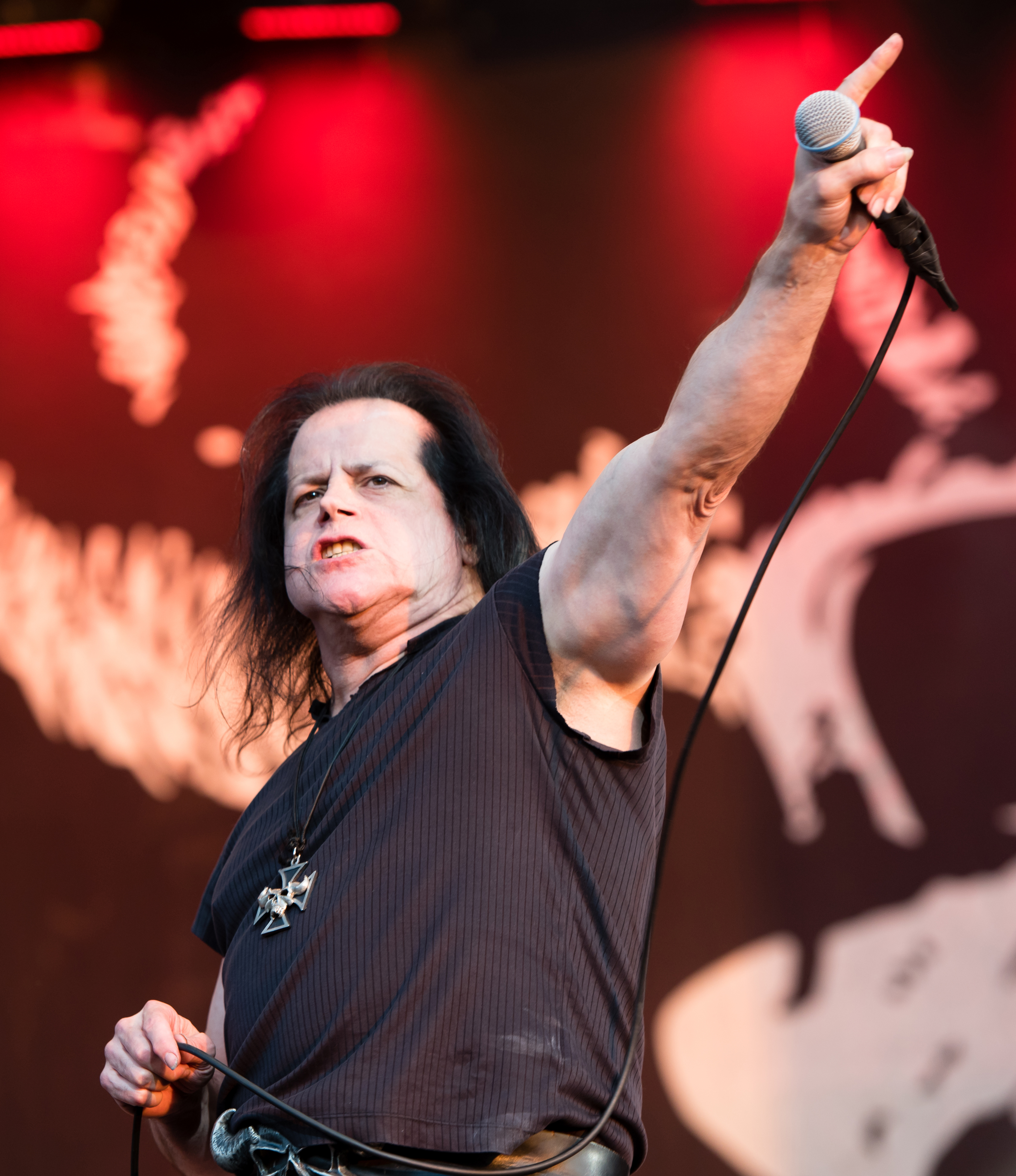 Danzig beim Wacken Open Air 2018